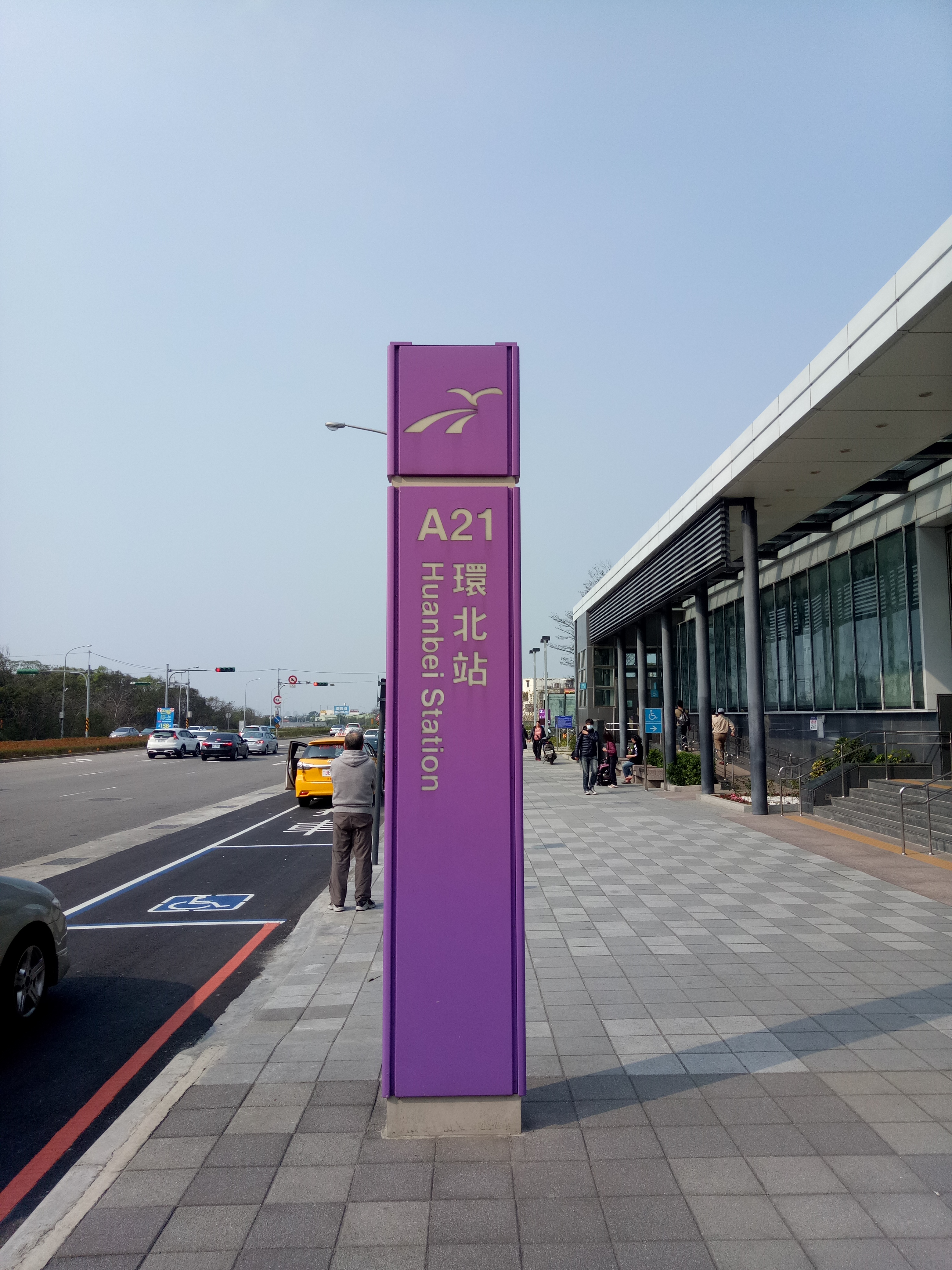 桃園機場捷運環北站立牌